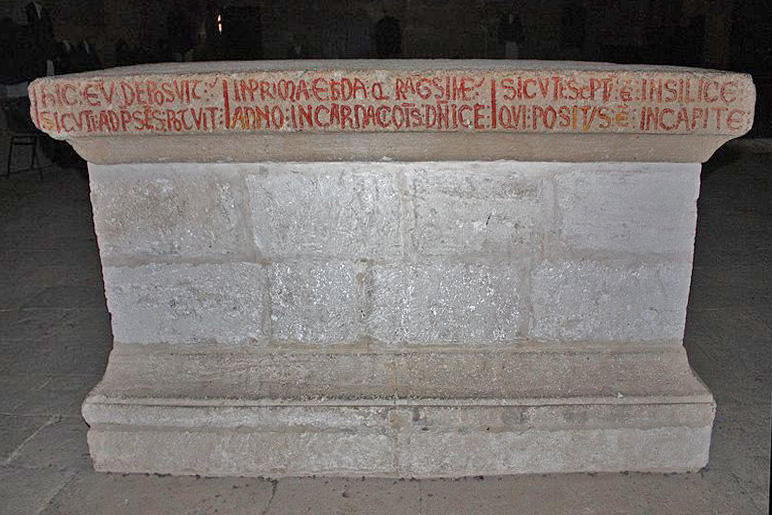 Cathédrale_de_Maguelone-autel_1°_étage.